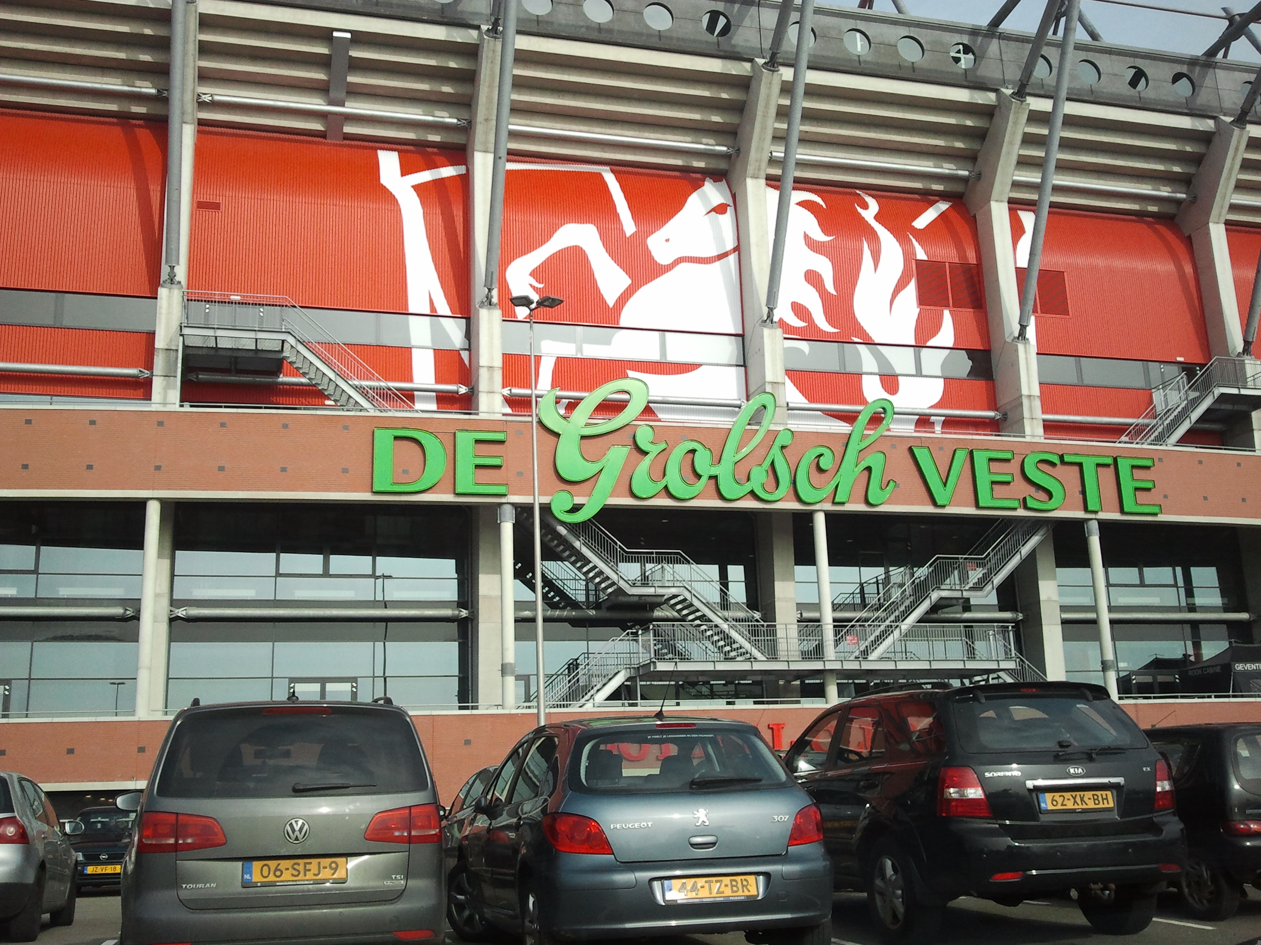 Nieuwe hoofdingang van de Grolsch Veste met daarbij het Twente Ros